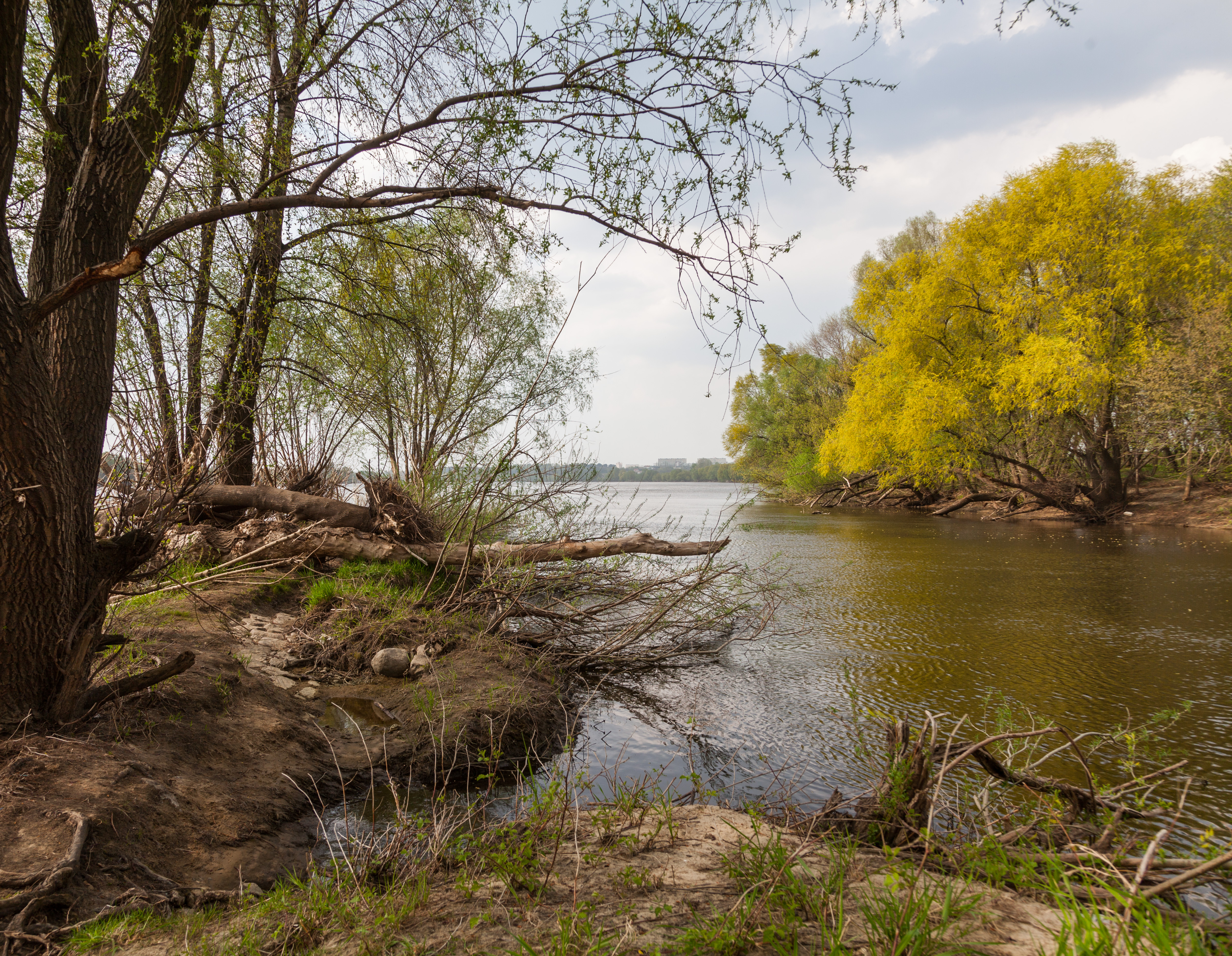 Ujście Drwęcy do Wisły.